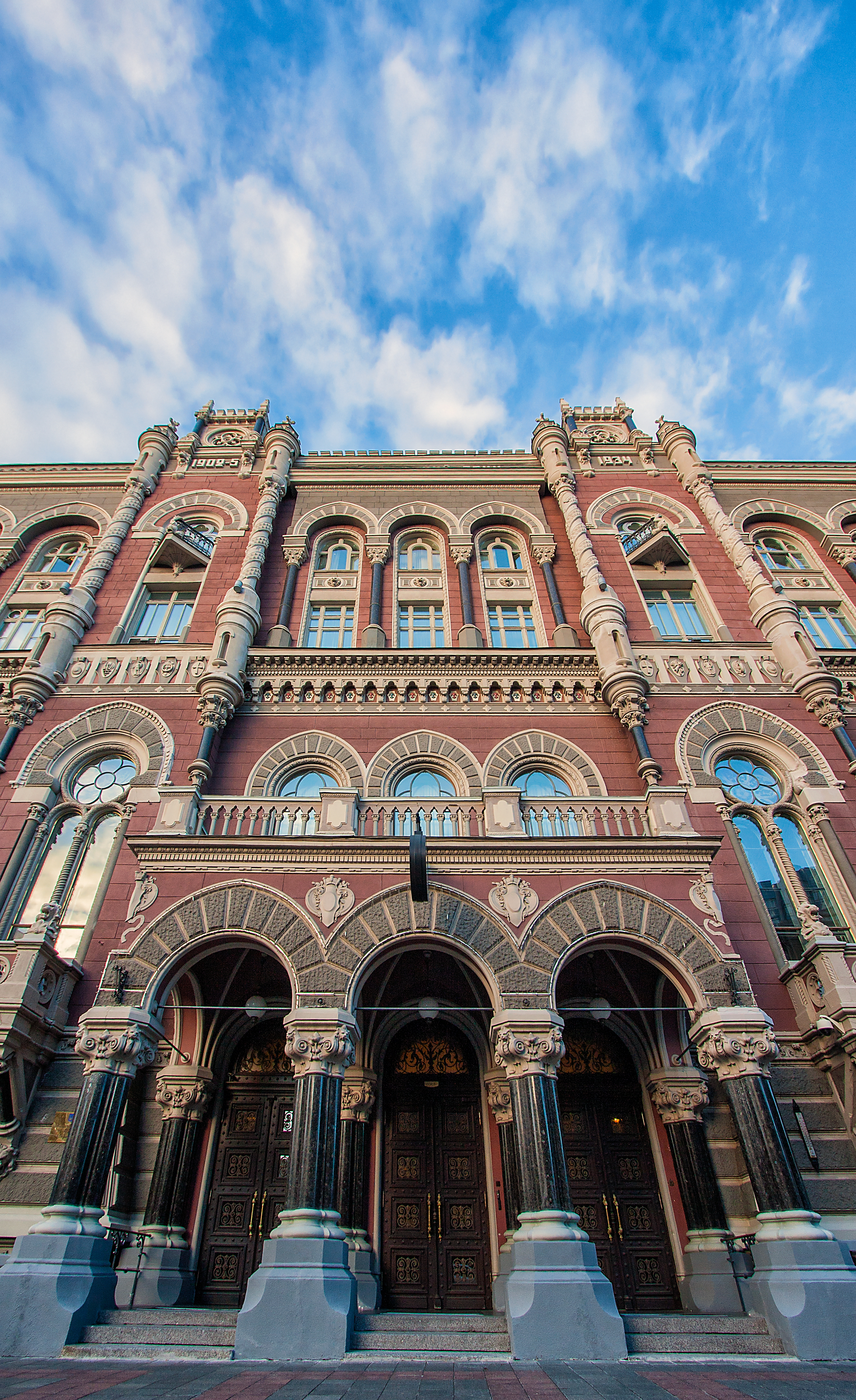 Будинок Київської контори Державного банку, якою на початку XX ст. управляв Г. О. Афанасьєв, історик, громадський діяч; на місці якого стояв житловий будинок, де у 1822–1825 роках відбувалися таємні збори декабристів, Київ, Інститутська вул., 9-а